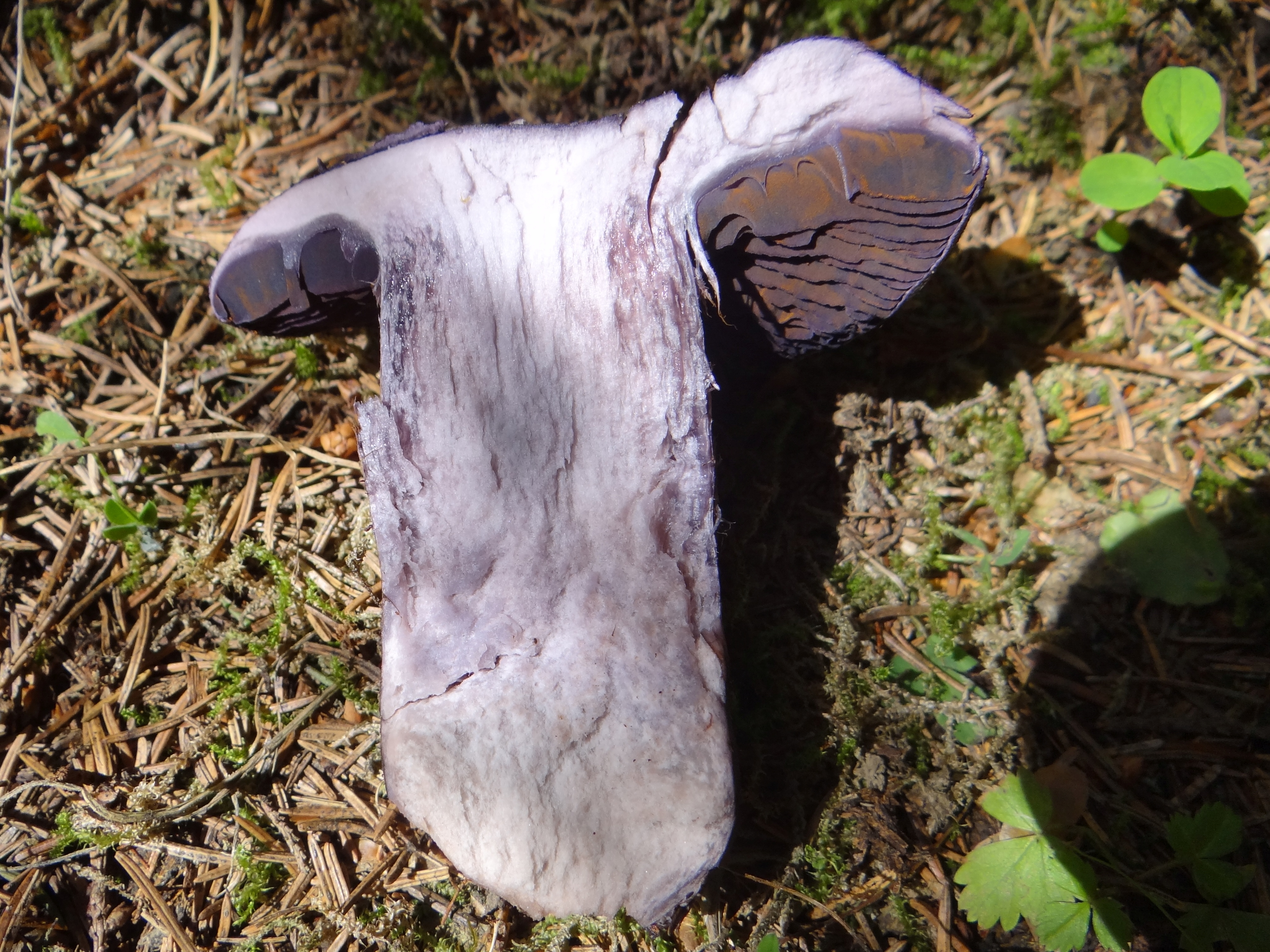 Cortinarius violaceus (location: Spišská Magura, Osturňa)